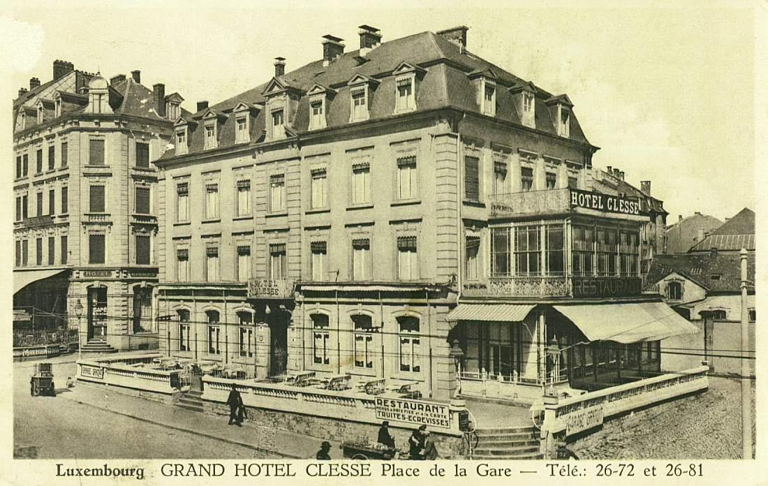 Luxembourg, place de la Gare: Hôtel Clesse, vers 1900